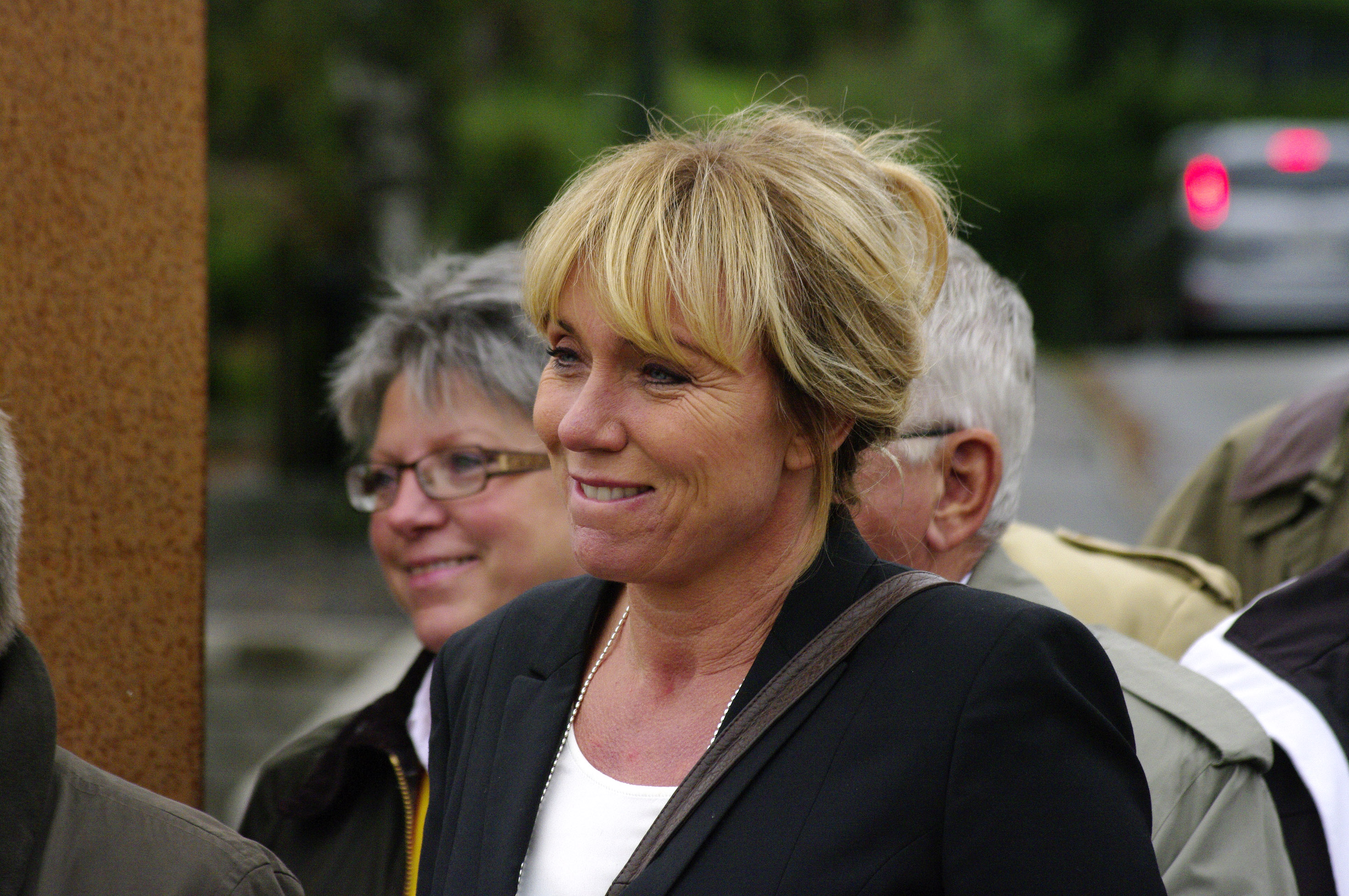 Anne Lundberg år 2012